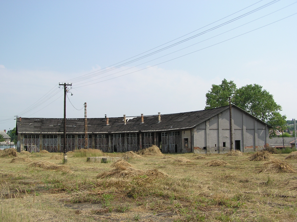 A kisterenyei körfűtőház 2006 nyarán